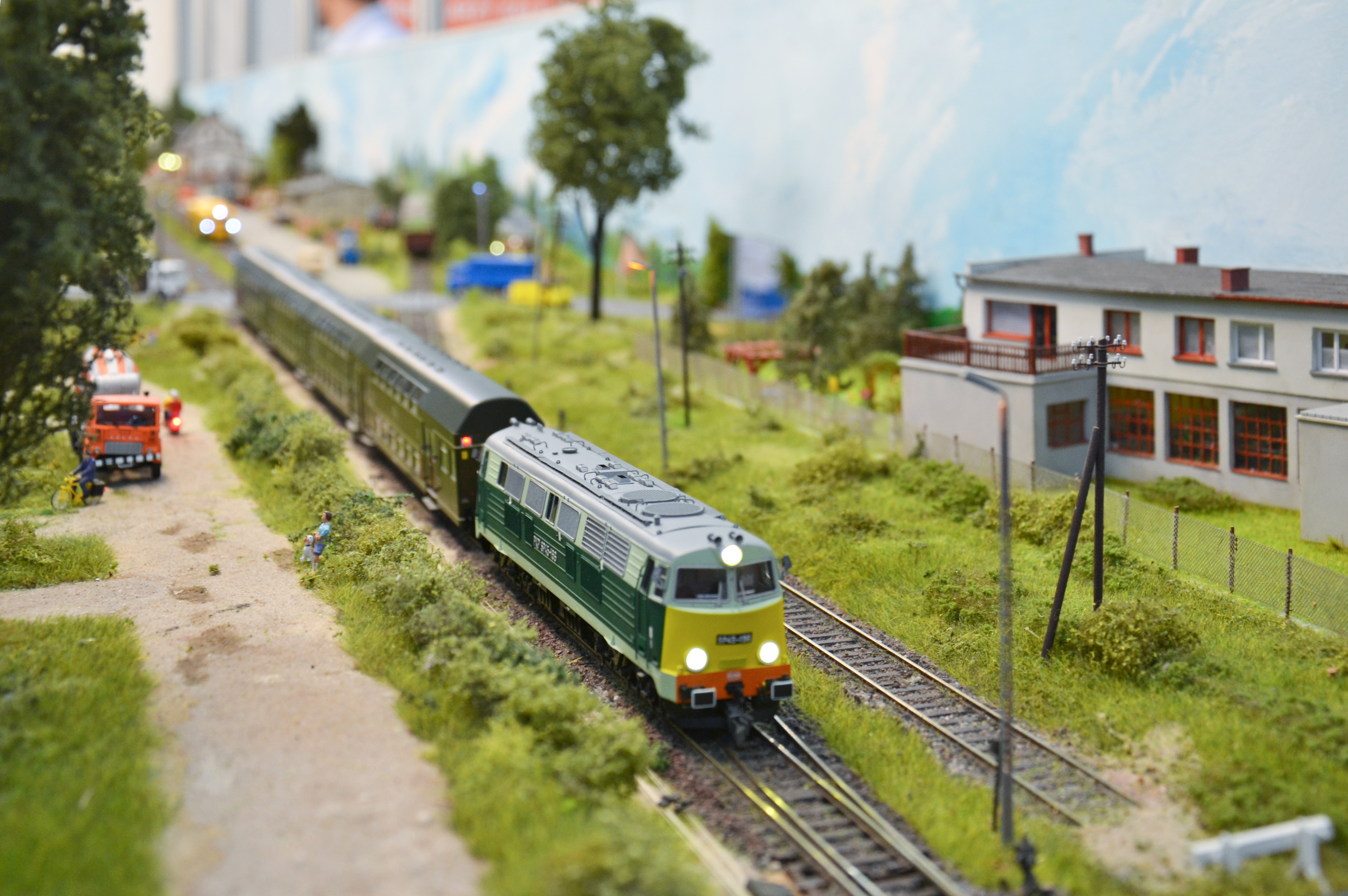 Makieta w Zespole Szkół Komunikacji im. Hipolita Cegielskiego w Poznaniu This photo was taken during Railway Wikiexpedition 2015 set up by Wikimedia Polska Association in cooperation with Fundacja Grupy PKP.You can see all photographs in category Wikiekspedycja kolejowa 2015.